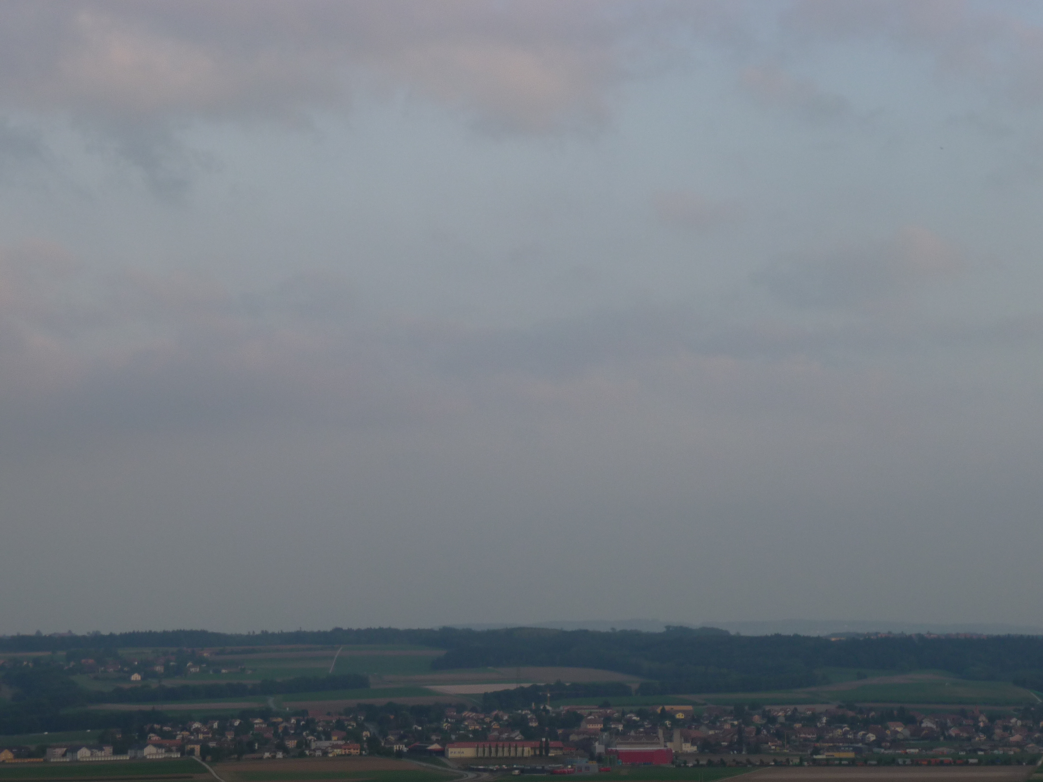 Chavornay.